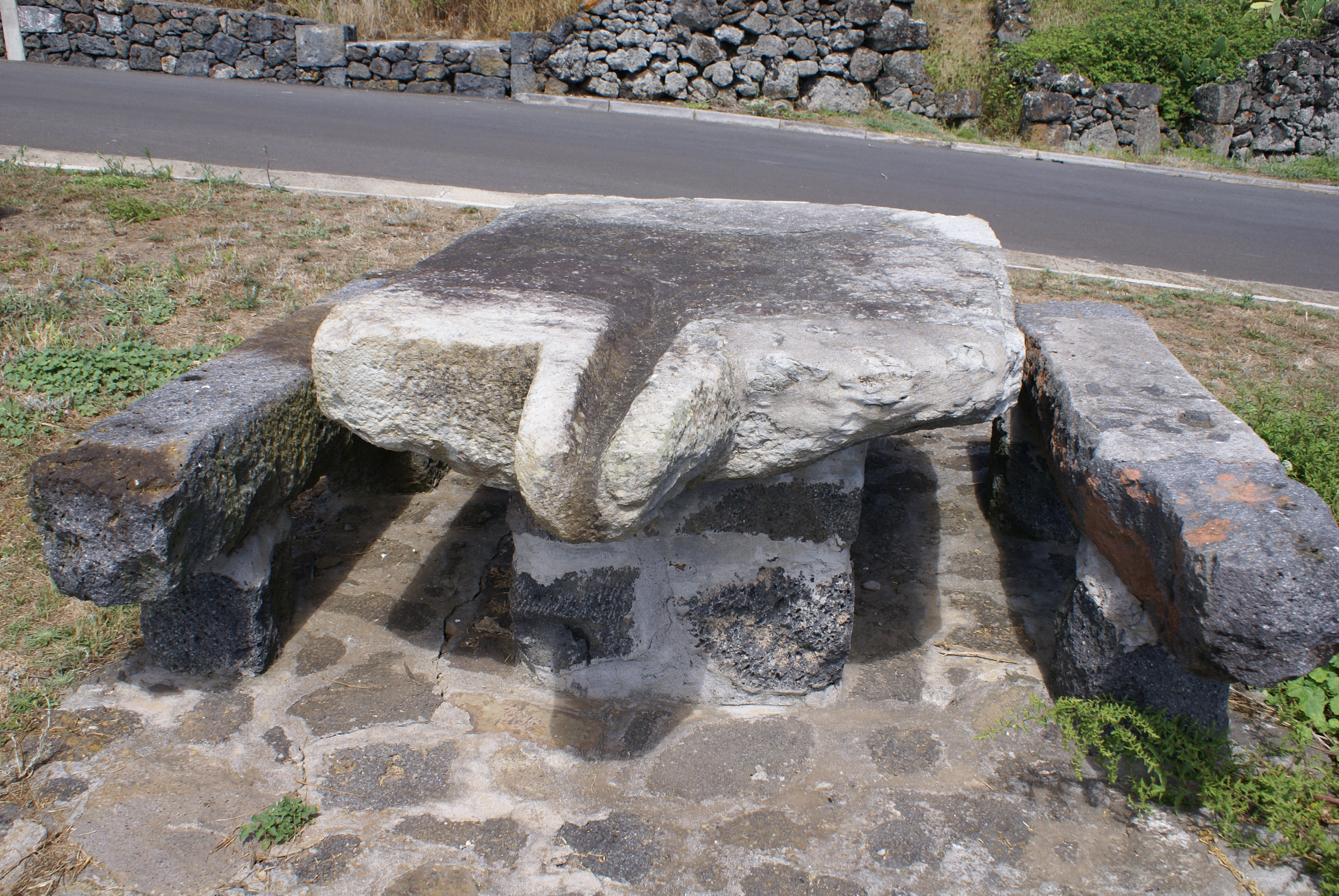 Fajã da Beira Mar, lagar em basalto, Santa Cruz da Graciosa, ilha Graciosa, Açores, Portugal